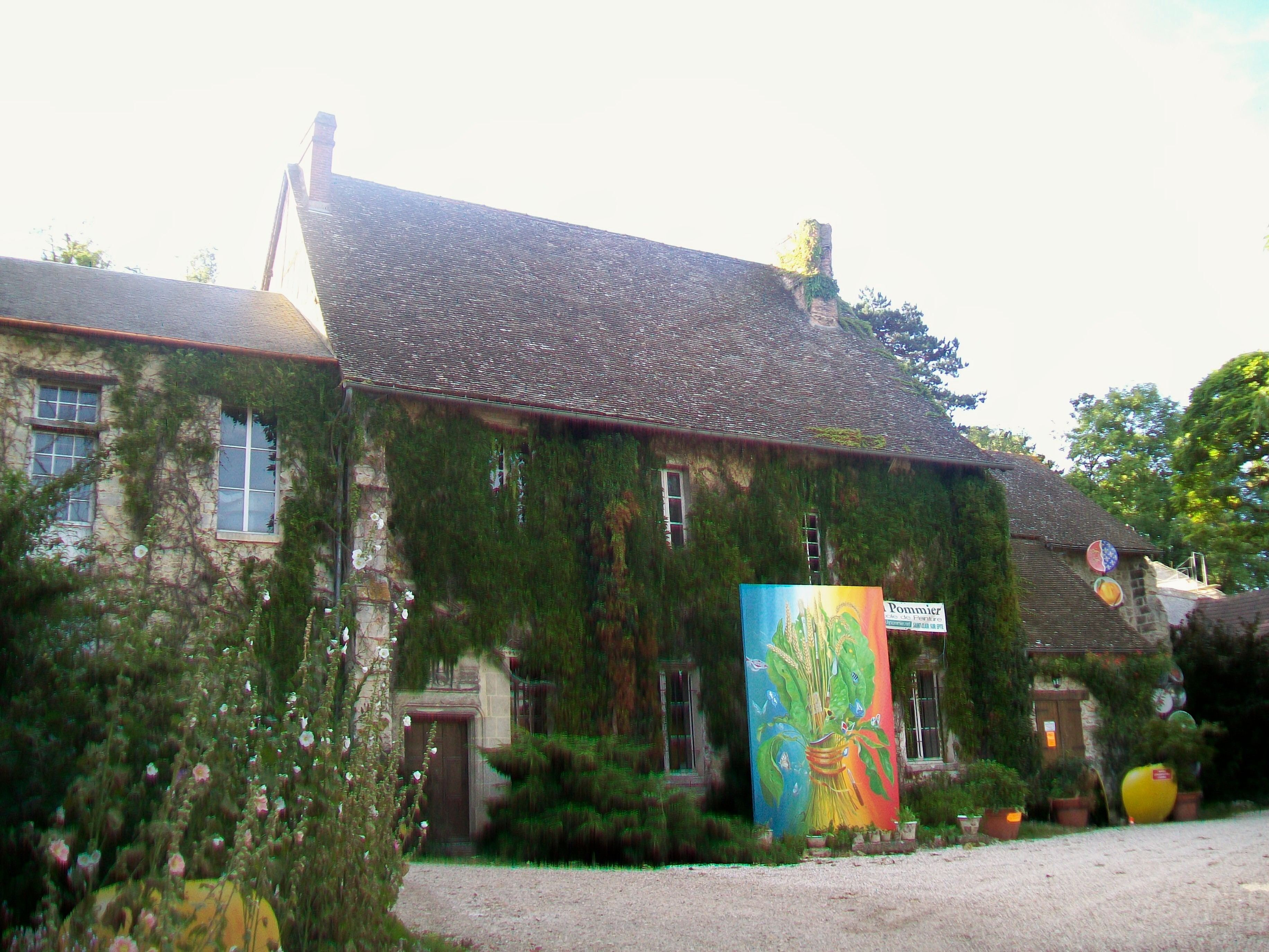 Corps de logis principal de l'ancien prieuré ; à droite, vestige de la chapelle.